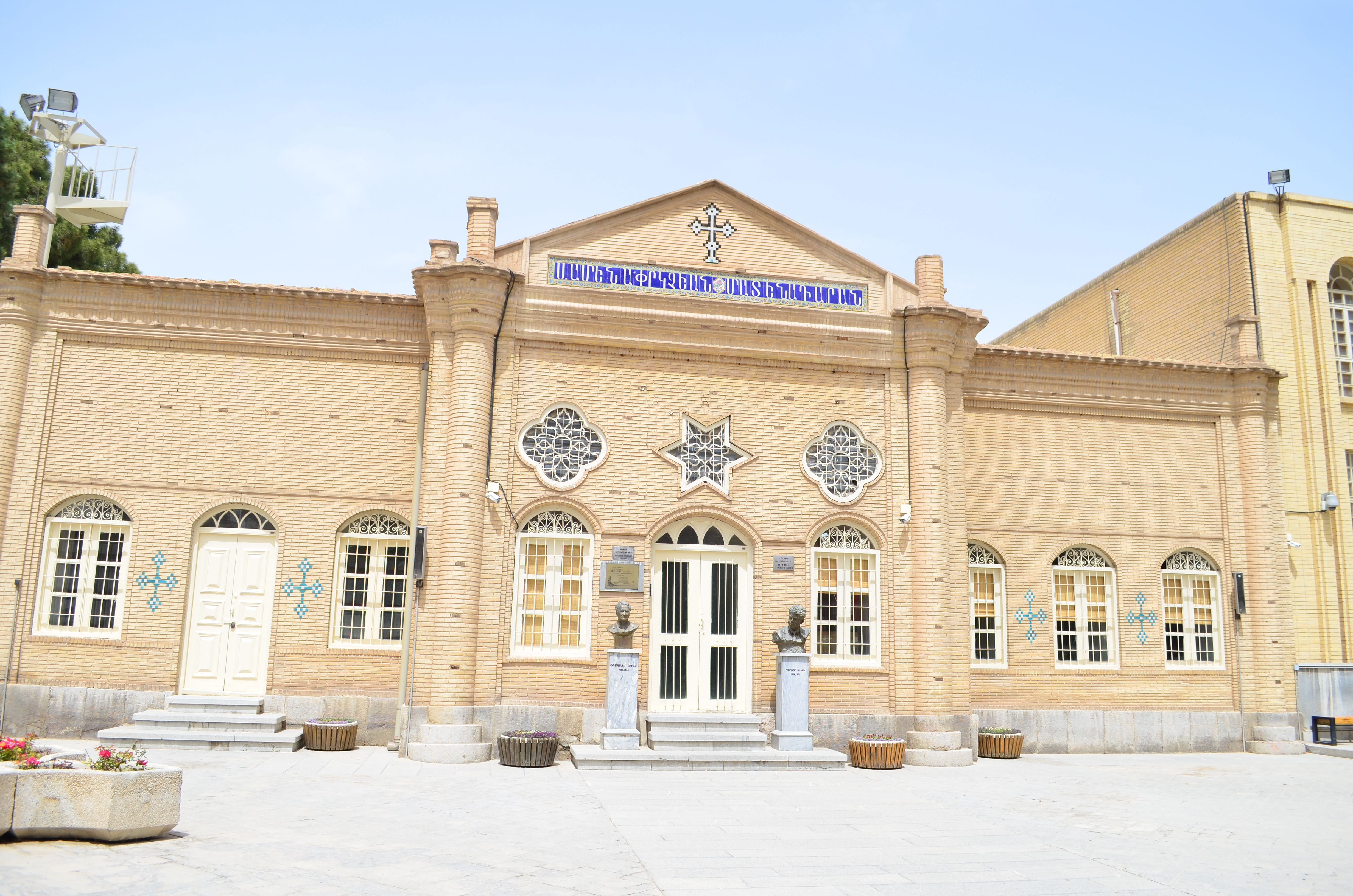 کلیسای وانک، اصفهان، ایران